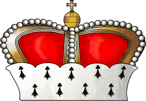 Knížecí hodnostní korunka